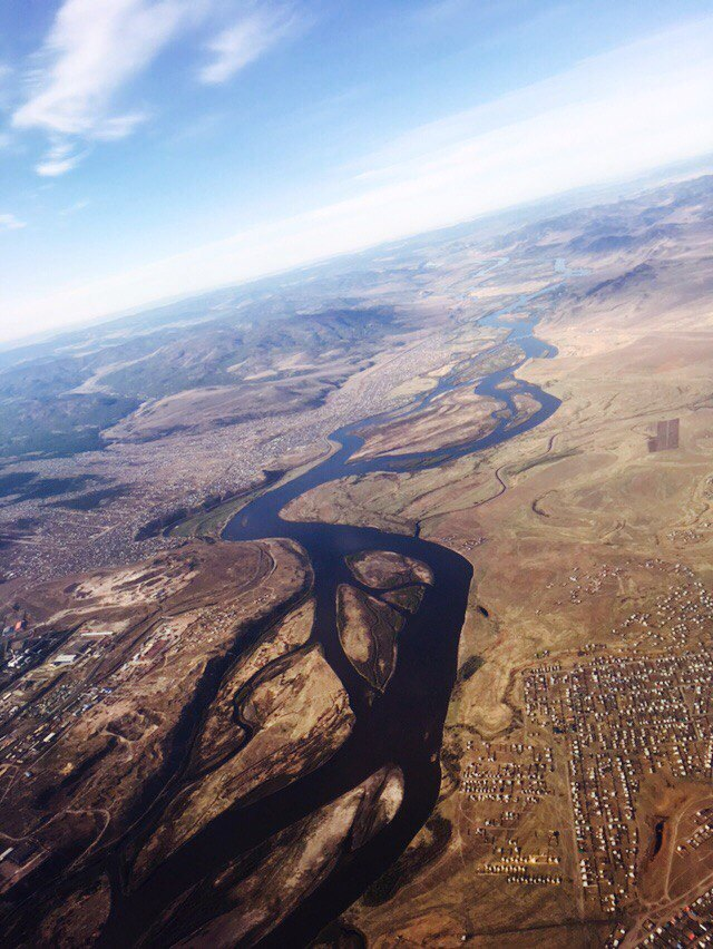 The Selenga River near the city of Ulan-Ude